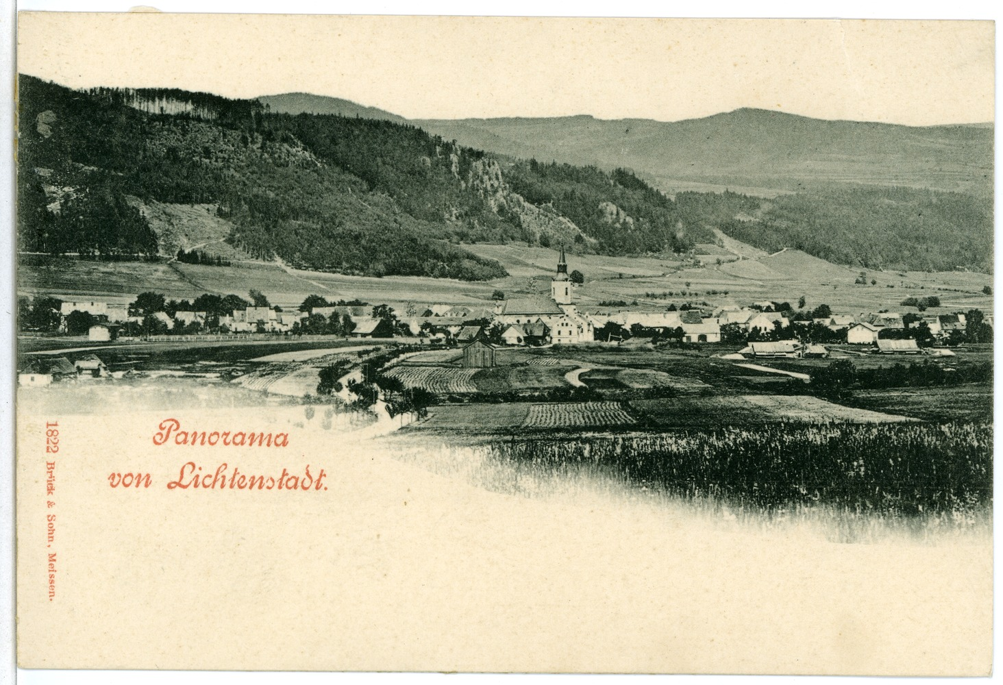 Lichtenstadt; Panorama This postcard is from publisher Brück & Sohn in Meißen ( This postcard has a unique number 01822 and is available in a higher resolution at the publisher. This images was uploaded in a cooperation project between Wikipedians and the publisher.